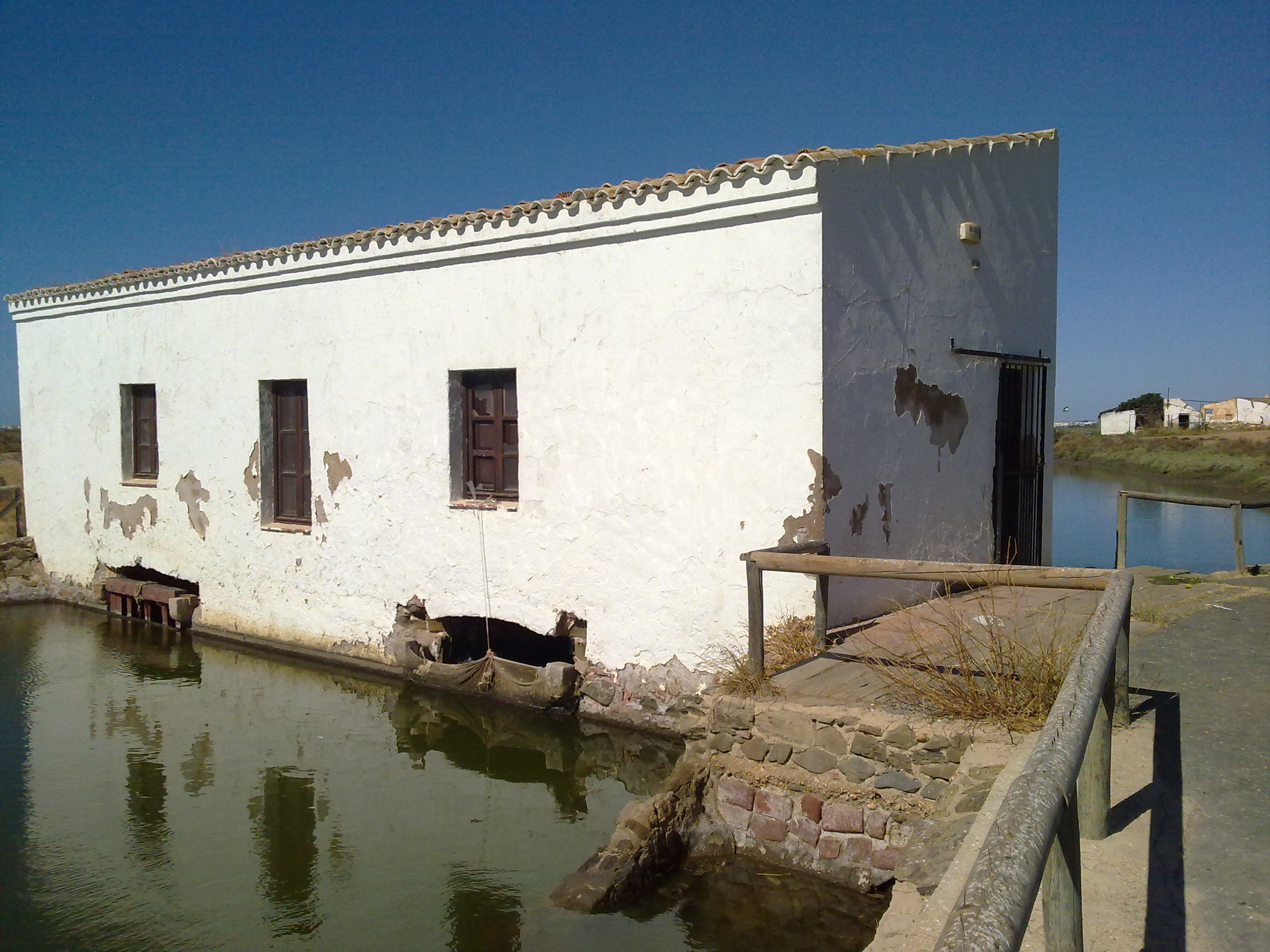 Vista trasera (hacia donde va el agua) del molino mareal de Isla Cristina tras su restauración para convertirse en el ecomuseo para la interpretación del Paraje Natural de las Marismas de Isla Cristina